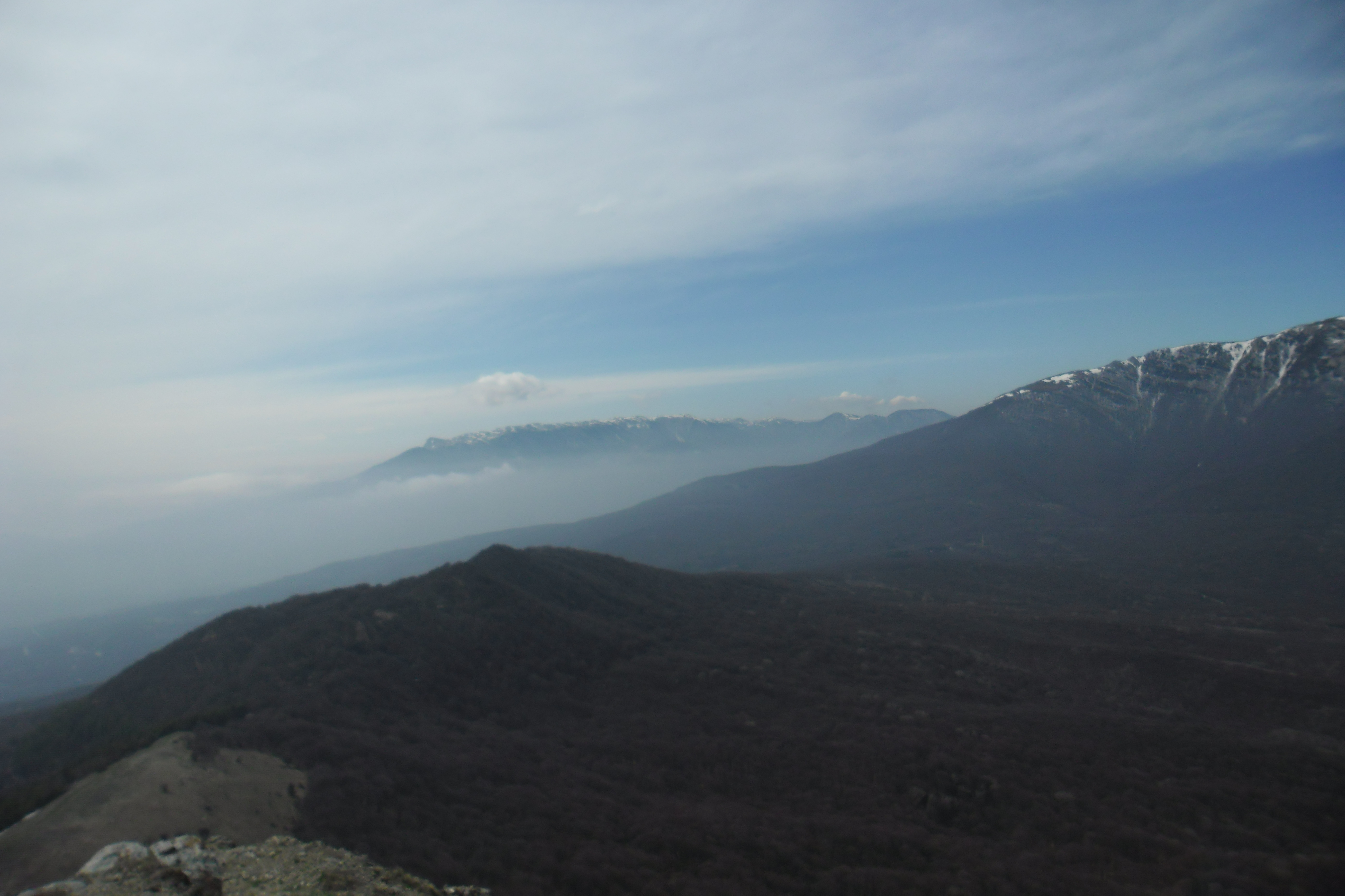 Ельхам-Кая